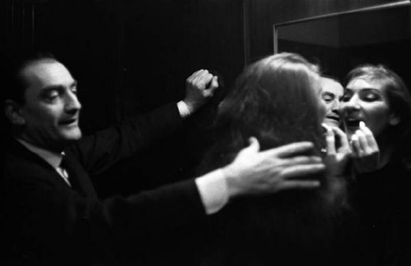 Milano: Teatro alla Scala - Spettacolo Anna Bolena, 1957, regia di Luchino Visconti - Camerino, interno - Maria Callas (cantante lirica) si trucca allo specchio - Luchino Visconti, regista